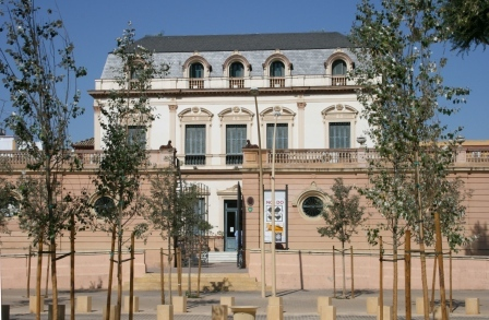 Fachada principal de la Casa de Las Sirenas, en la Alameda de Hércules. (Sevilla)